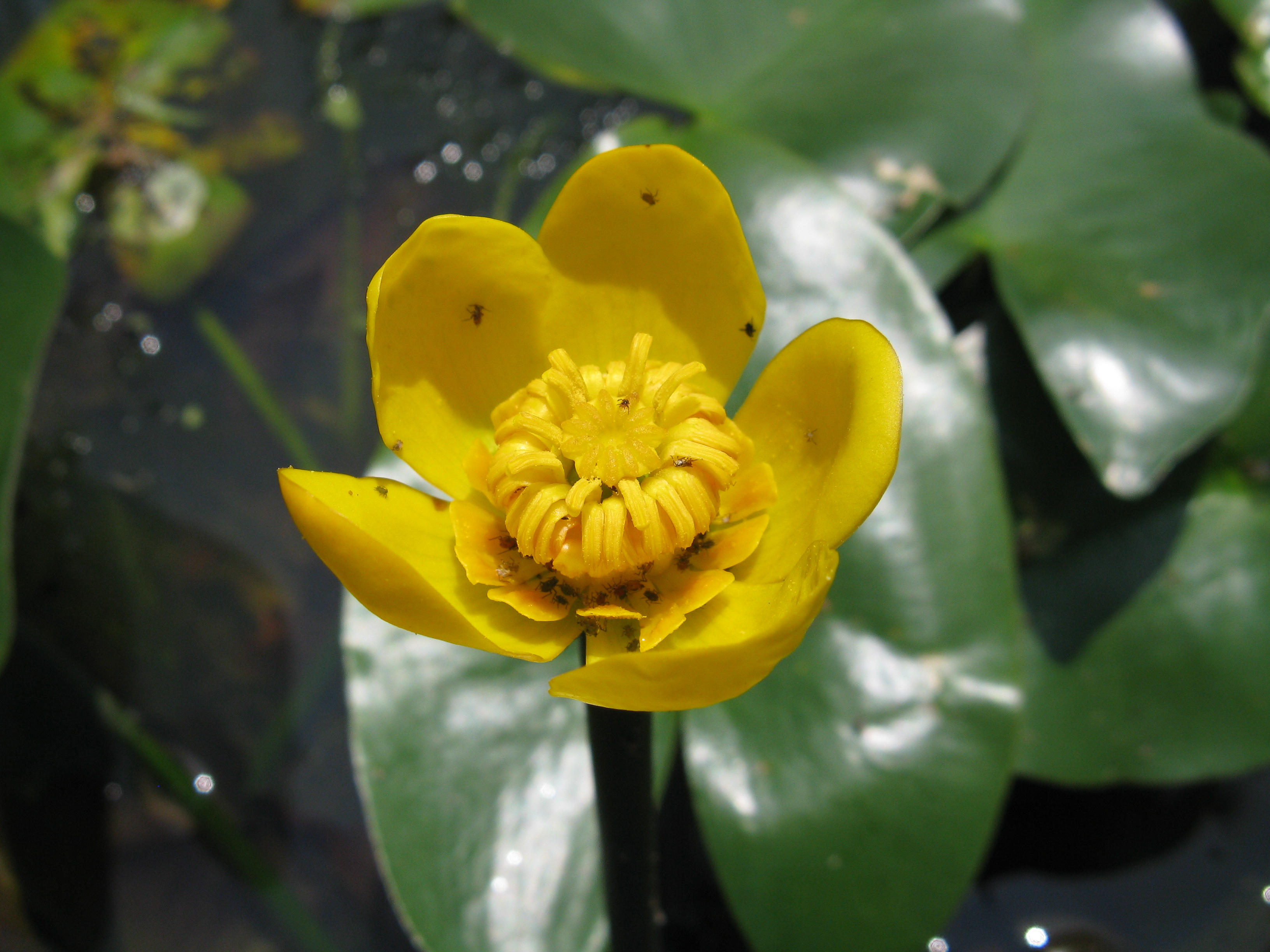 Scientific name Nuphar japonica (syn. Nuphar subintegerrimum)